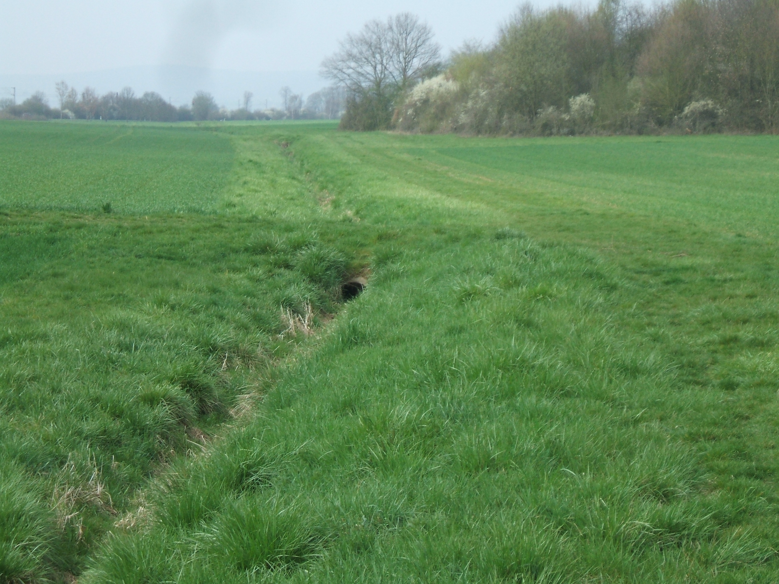 Der Säckelgraben unterhalb des Feldgehölzes auf dem Weg zum Weg nach Steinfurth, im Hintergrund Hausberg und weiter links Heidelbeerberg